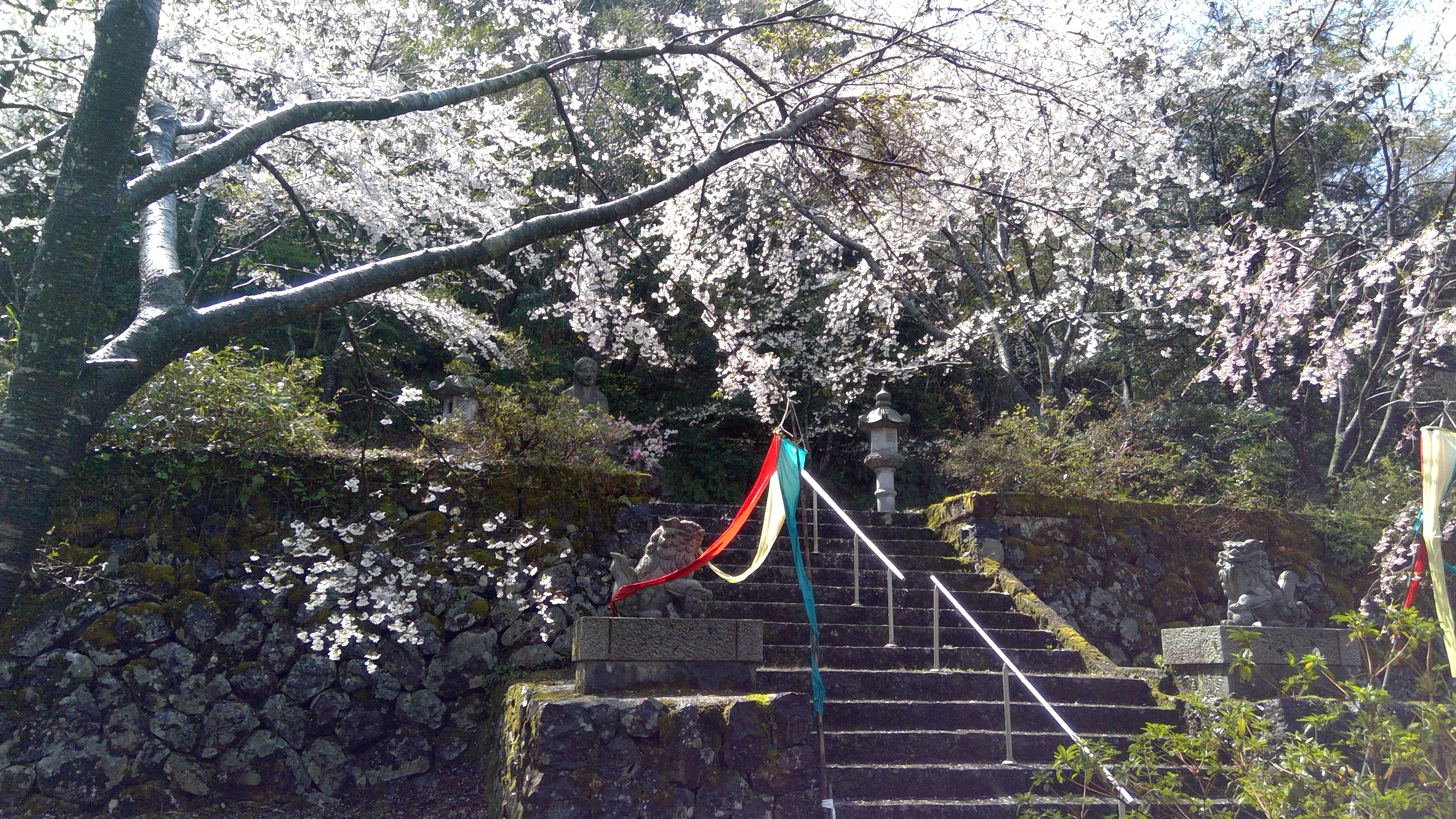 日本遺産「丹後ちりめん回廊」構成文化財のひとつ丹後大仏